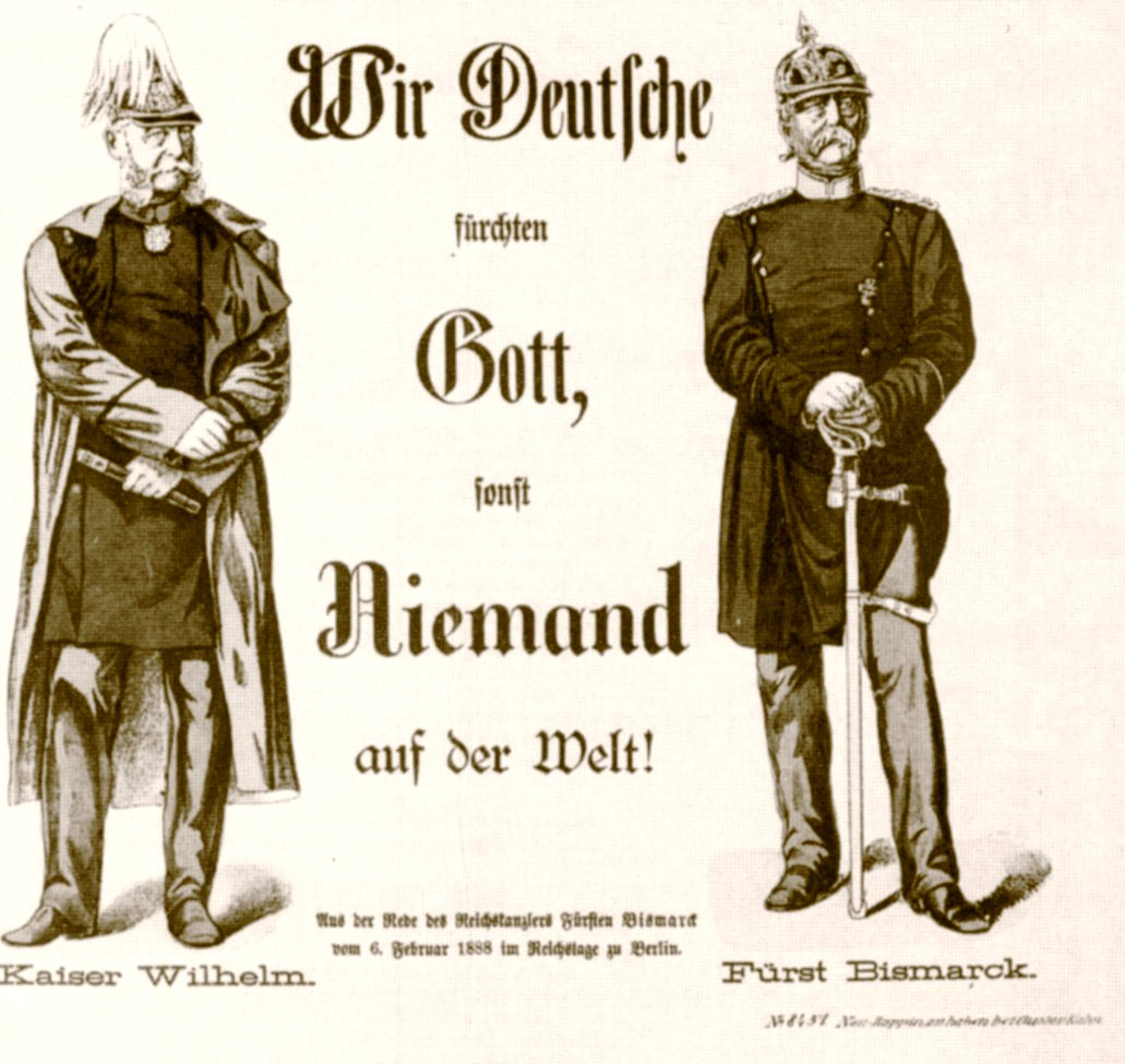 Propagandadruck 1888 (Neuruppiner Bilderbogen, Kreidelithographie)